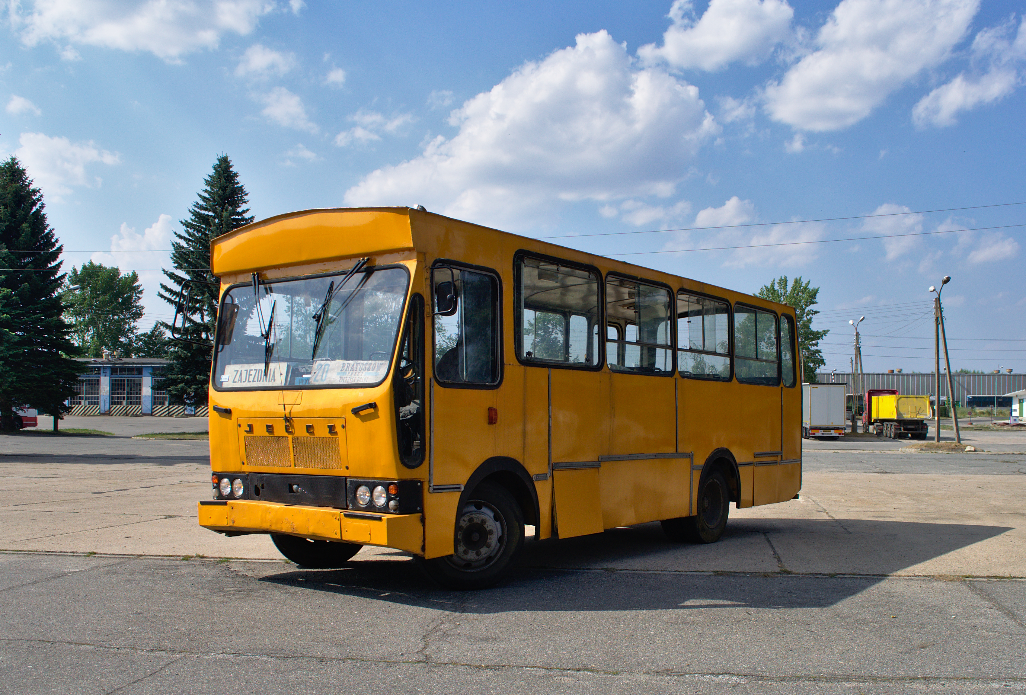 Jelcz 080. Zdjęcie wykonane dzięki uprzejmości Adama Zylbertala z Klubu Sympatyków Transportu Miejskiego z Wrocławia. jelcz080.pl